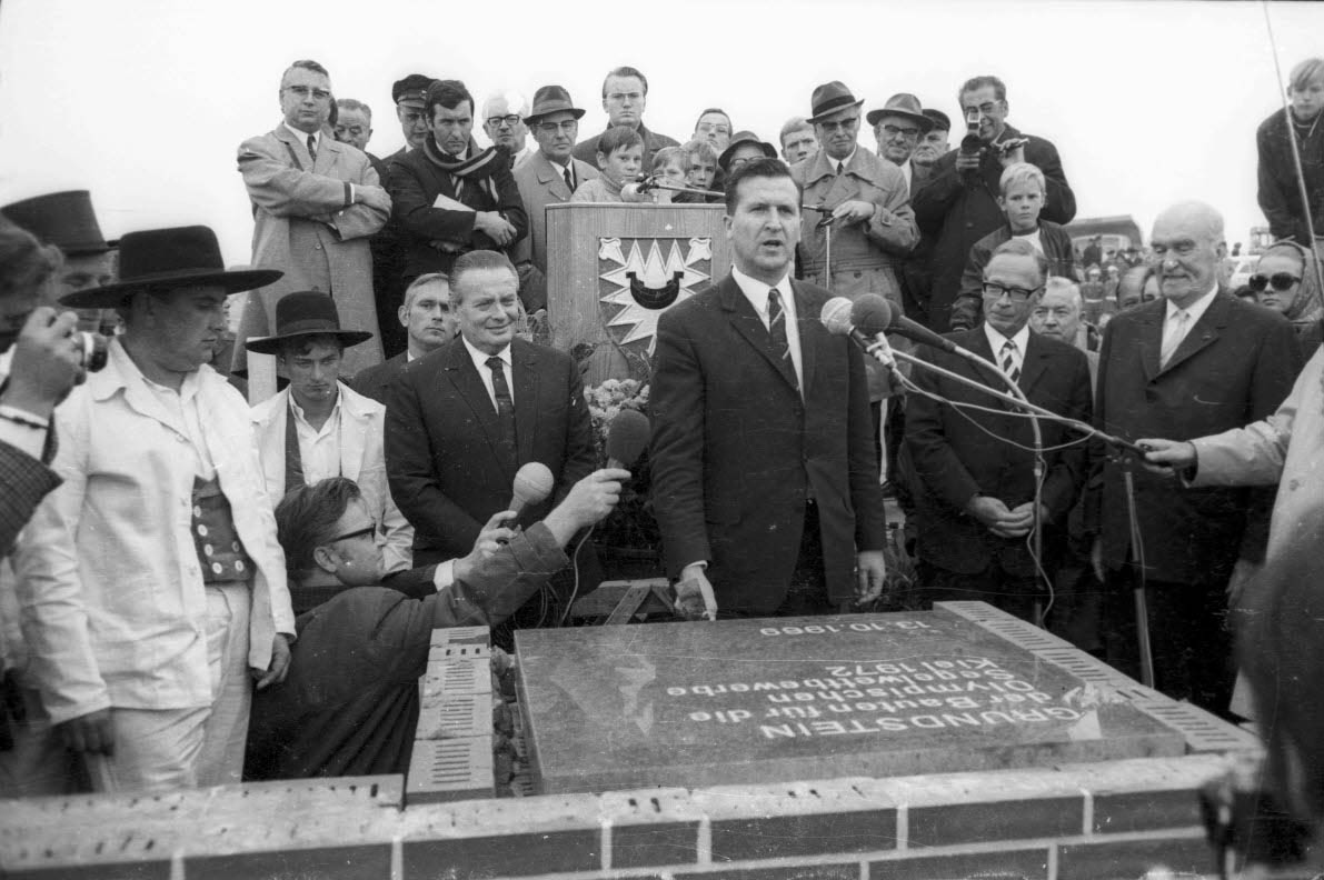 Grundsteinlegung des Olympiazentrums Schilksee: Es spricht der Oberbürgermeister von Kiel Günther Bantzer, links im Bild Willi Daume, Präsident des Nationalen Olympischen Komitees (NOK), rechts Prof. Dr. Ekkehard Geib, Staatssekretär im Finanzministerium des Landes Schleswig-Holstein und der Baron Erik von Frenckell, Vertreter des Internationalen Olympischen Komitees (IOC)